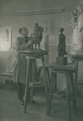 Jan Kodet (1910-1974), český sochař